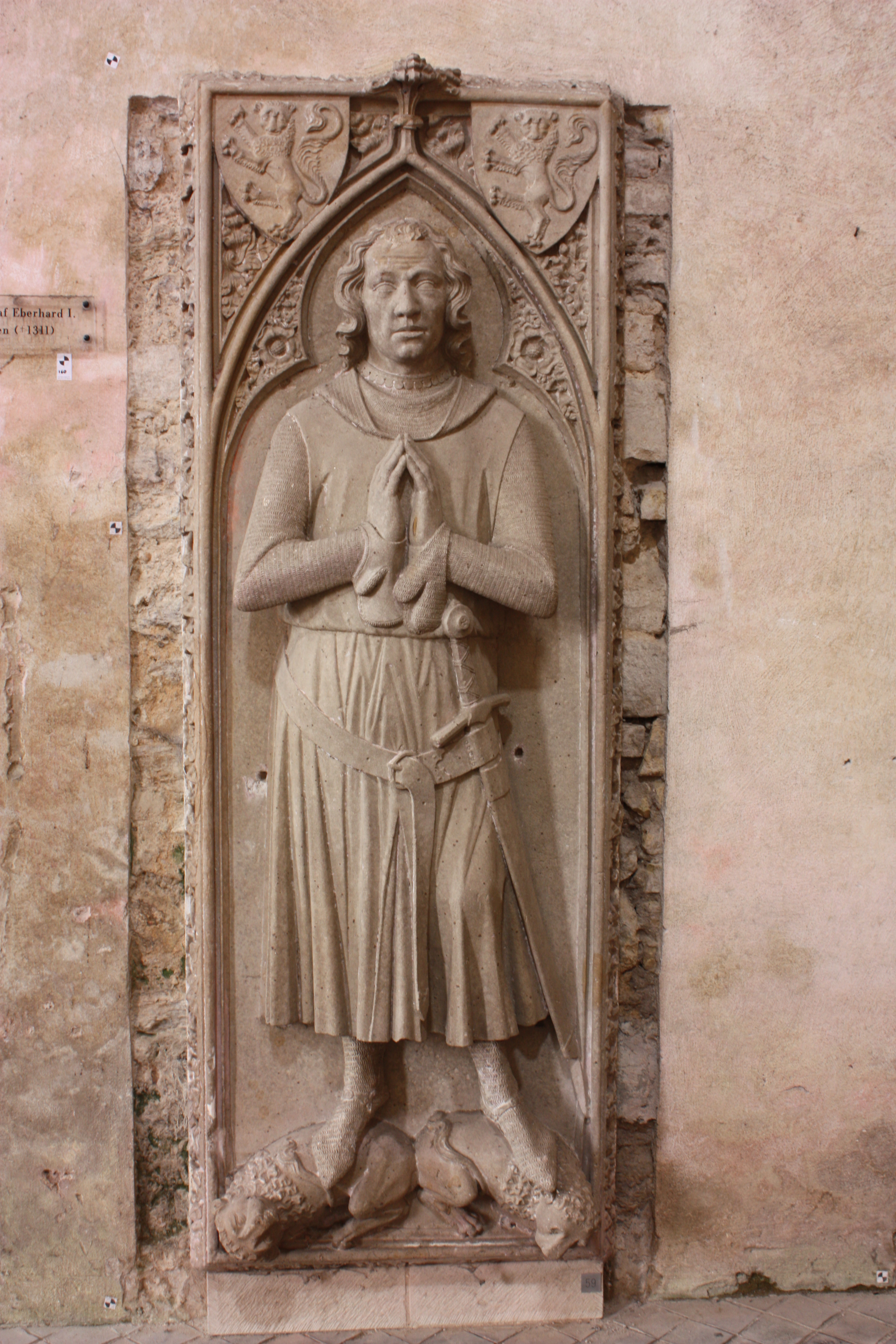 Grabplatte des Grafen Eberhard I von Katzenelenbogen (Nr. 59) in der Basilika des Kloster Eberbach